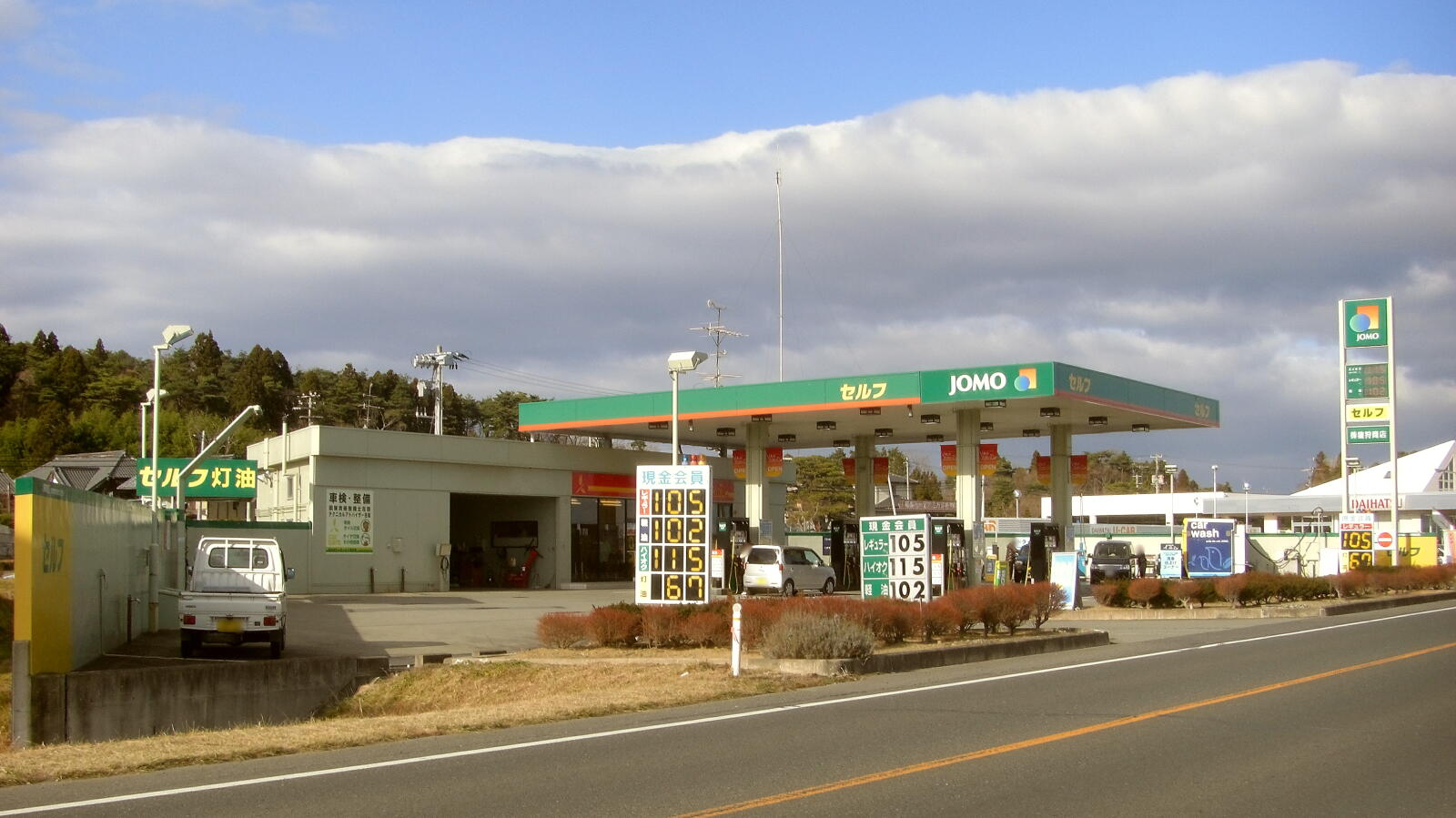 JOMO 原町南給油所